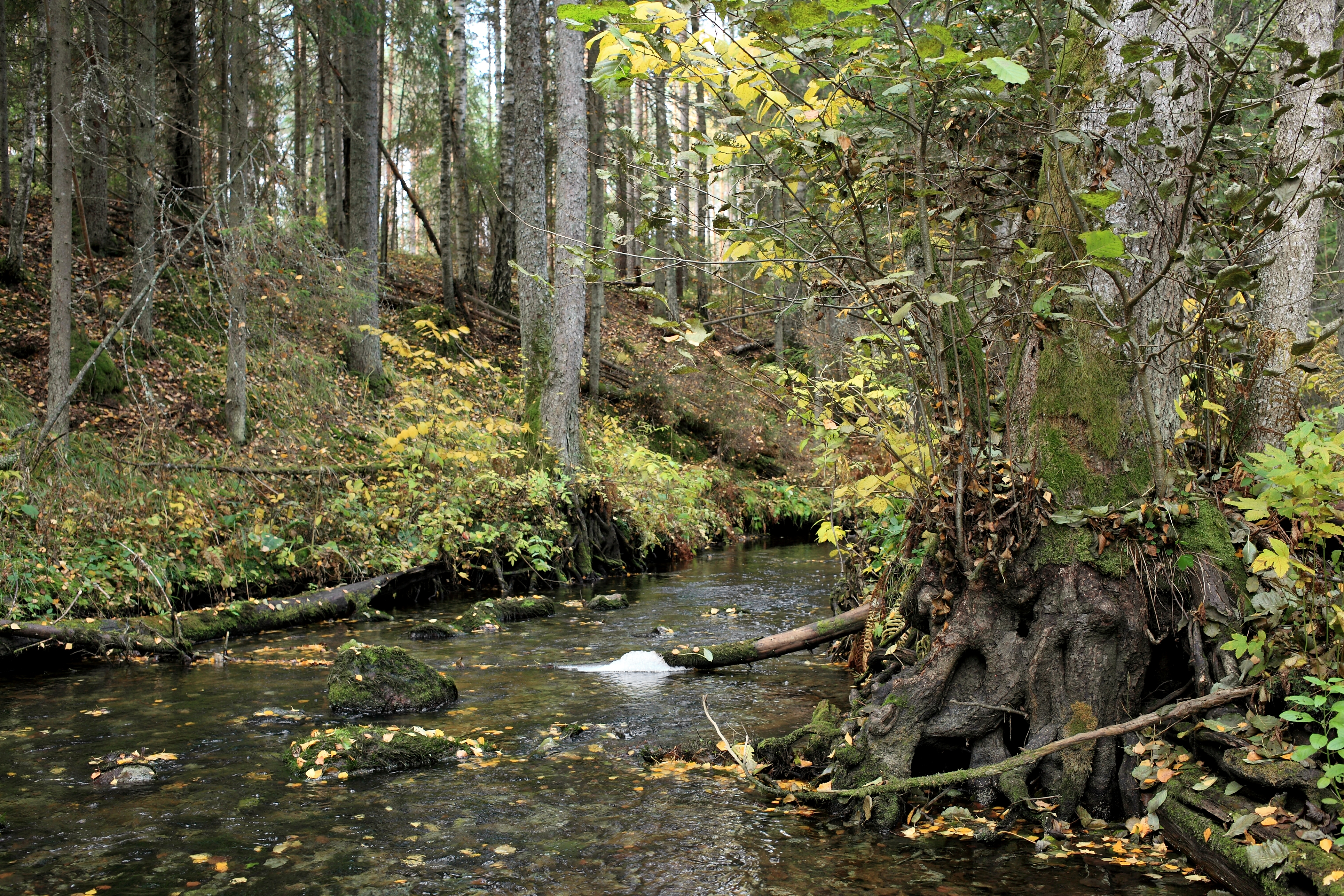 Kõrvemaa maastikukaitseala. Jänijõgi Krani lähedal.